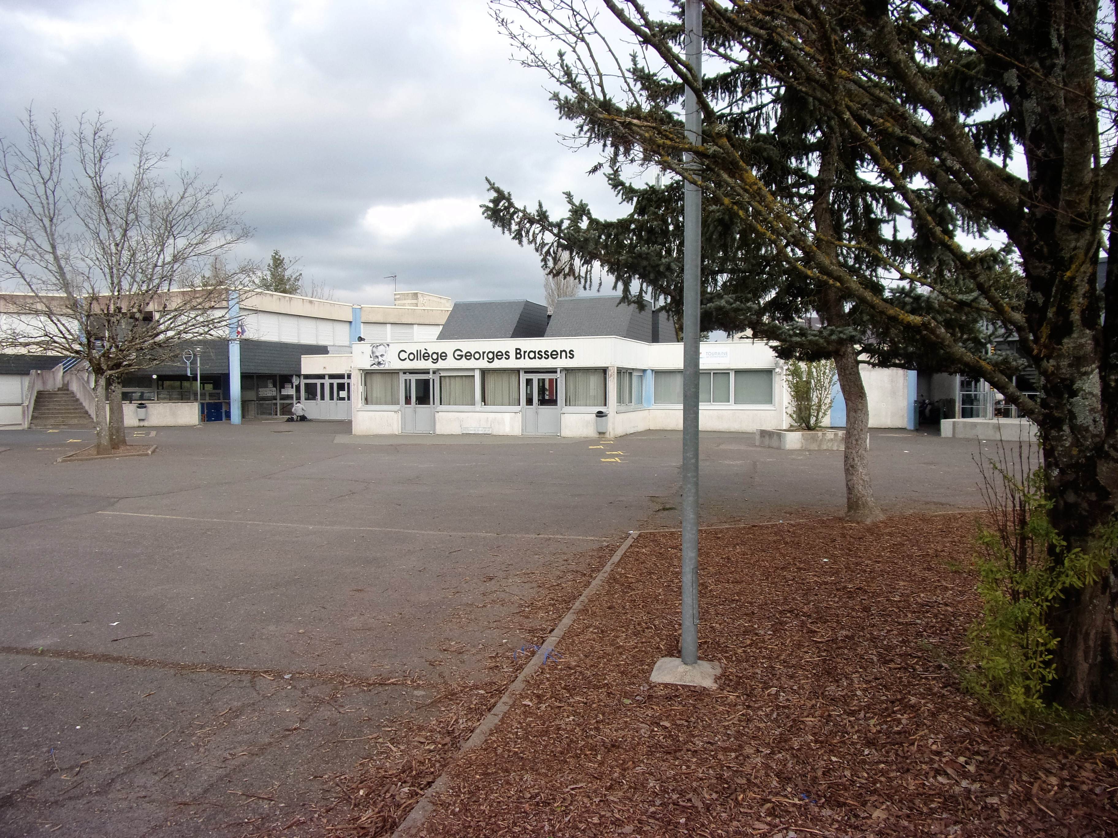 Entrée du collège Georges-Brassens à Esvres